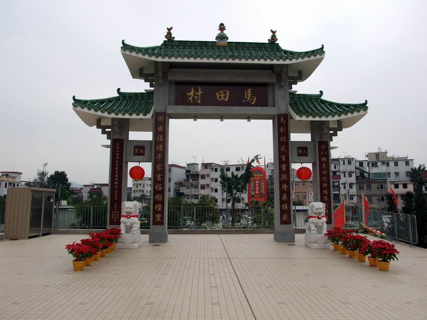 十八鄉馬田村牌樓